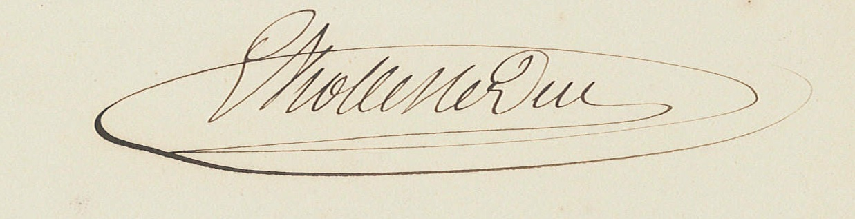 Signature d'Eugène Viollet-le-Duc, rapport sur les travaux de consolidation et de restauration exécutés et à exécuter à la cathédrale du Puy, 31 août 1848. Archives nationales, F/19/7823